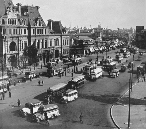 Vista de las dársenas con paradas de pasajeros de tranvías y colectivos sobre Plaza Constitución. A la derecha de la imagen se ve la fachada principal de la estación homónima, con el letrero "Gran Sur" del Ferrocarril Sud.